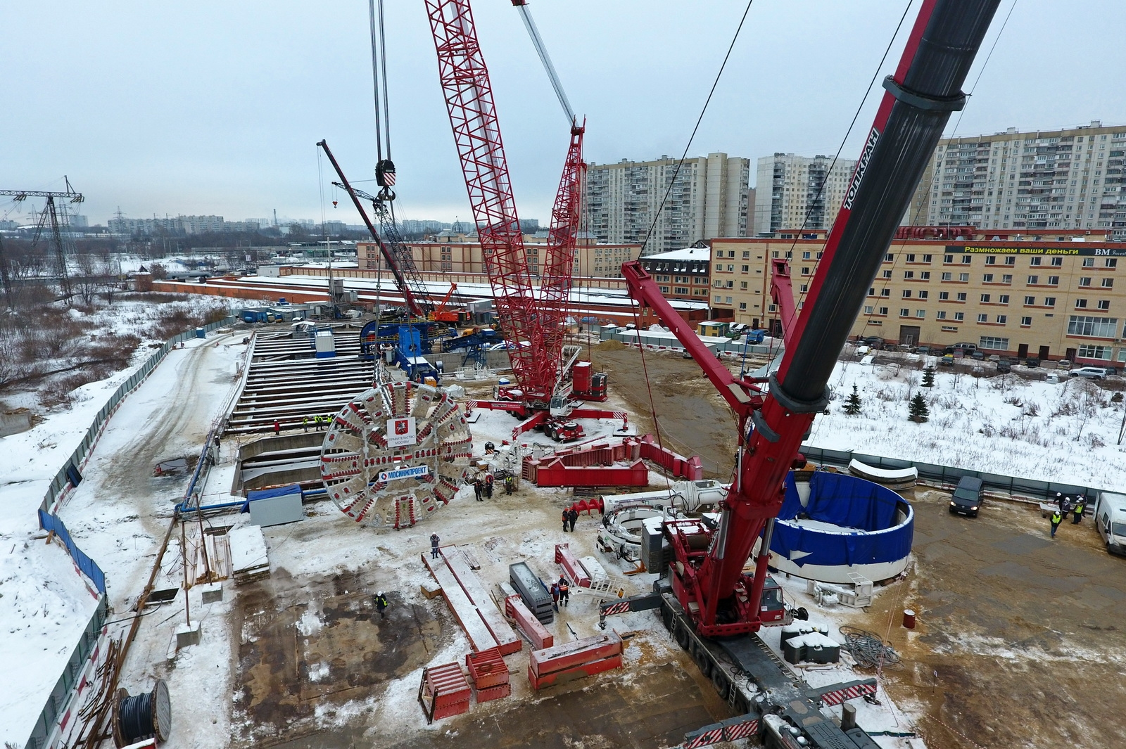 Монтажная камера для ТПМК на Кожуховской линии метро в районе начала Привольной улицы в Москве.